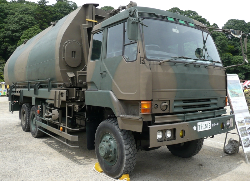 Type 92 fukyo. ja:92式浮橋。